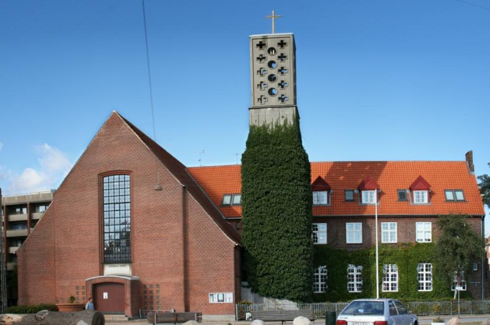 Enghave kirke, Enghave Sogn, Københavns Stift.